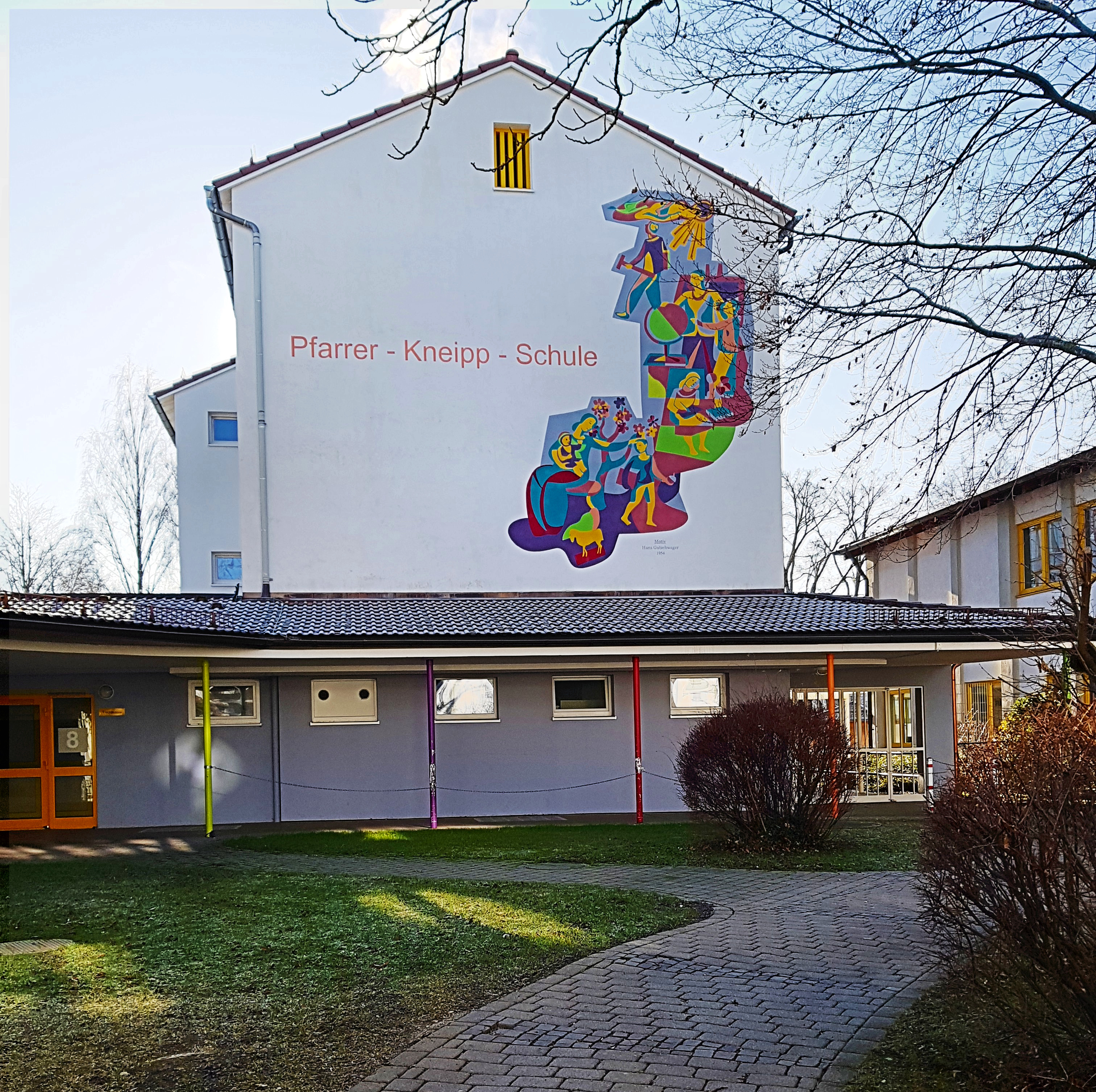 Bad Wörishofen, Pfarrer-Kneipp-Grund-und-Mittelschule, Landkreis Unterallgäu im Regierungsbezirk Schwaben